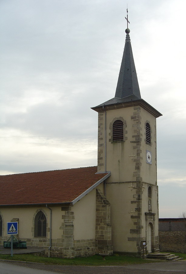 Eglise de Suriauville (Vosges)